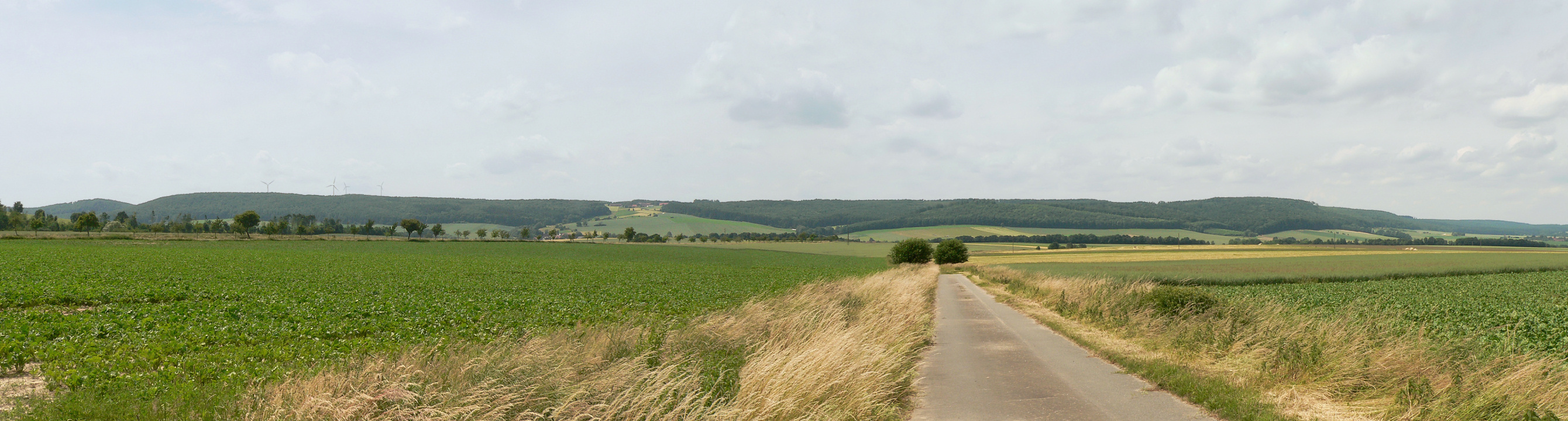 Heber von Osten gesehen